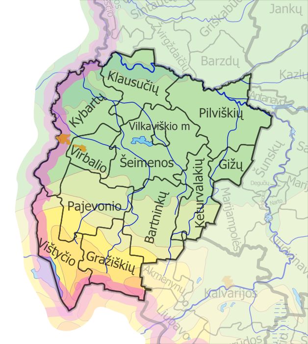 Padaryta iš :image:LietuvosSeniunijos.png